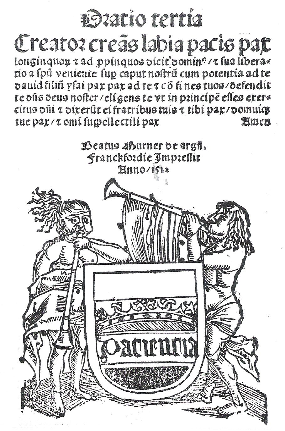 Kapitelüberschrift mit Wappen von Thomas Murner